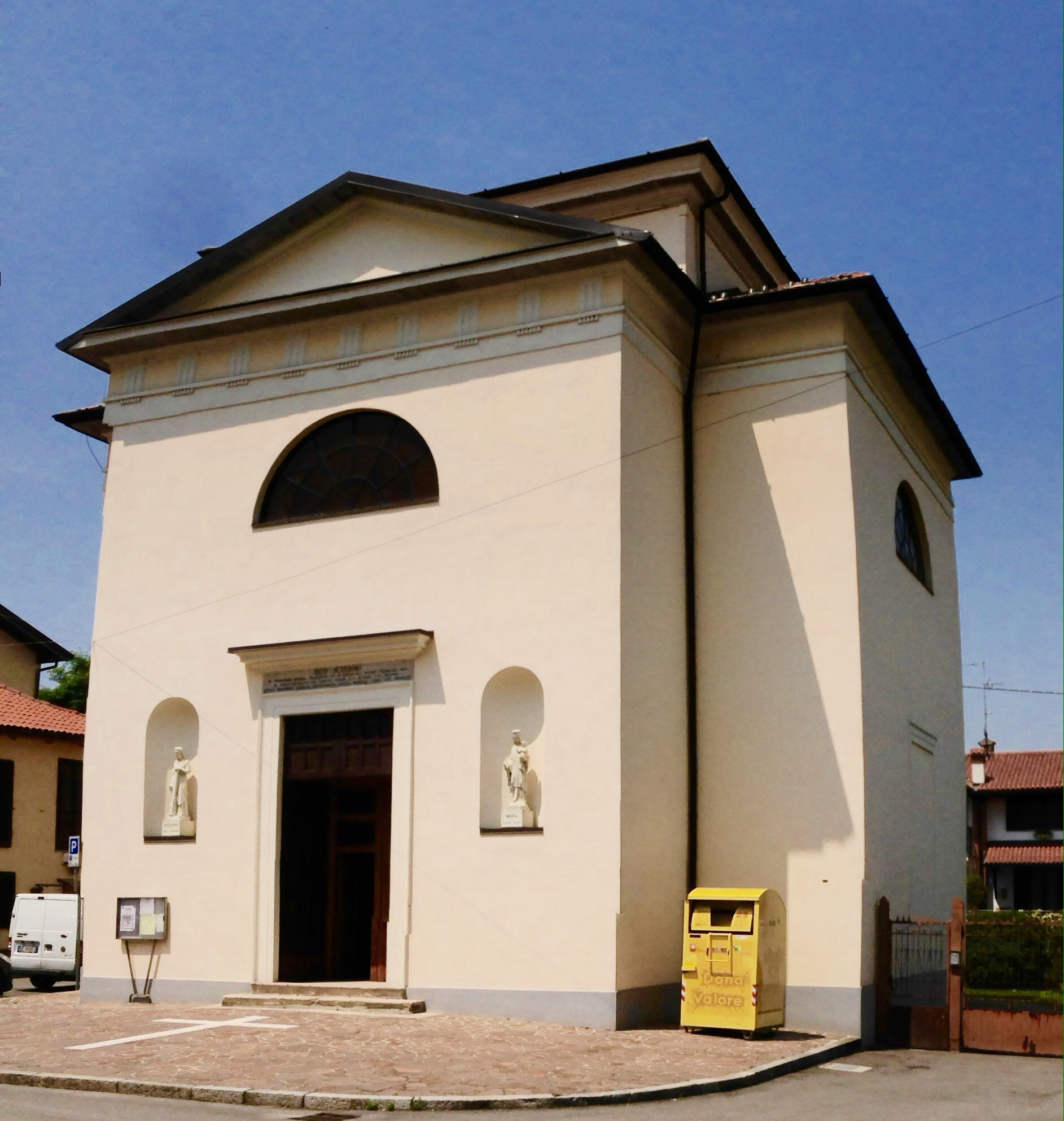 La chiesa di San Francesco di Monzoro (detta anche di Santa Maria Nascente dalla prima dedicazione)